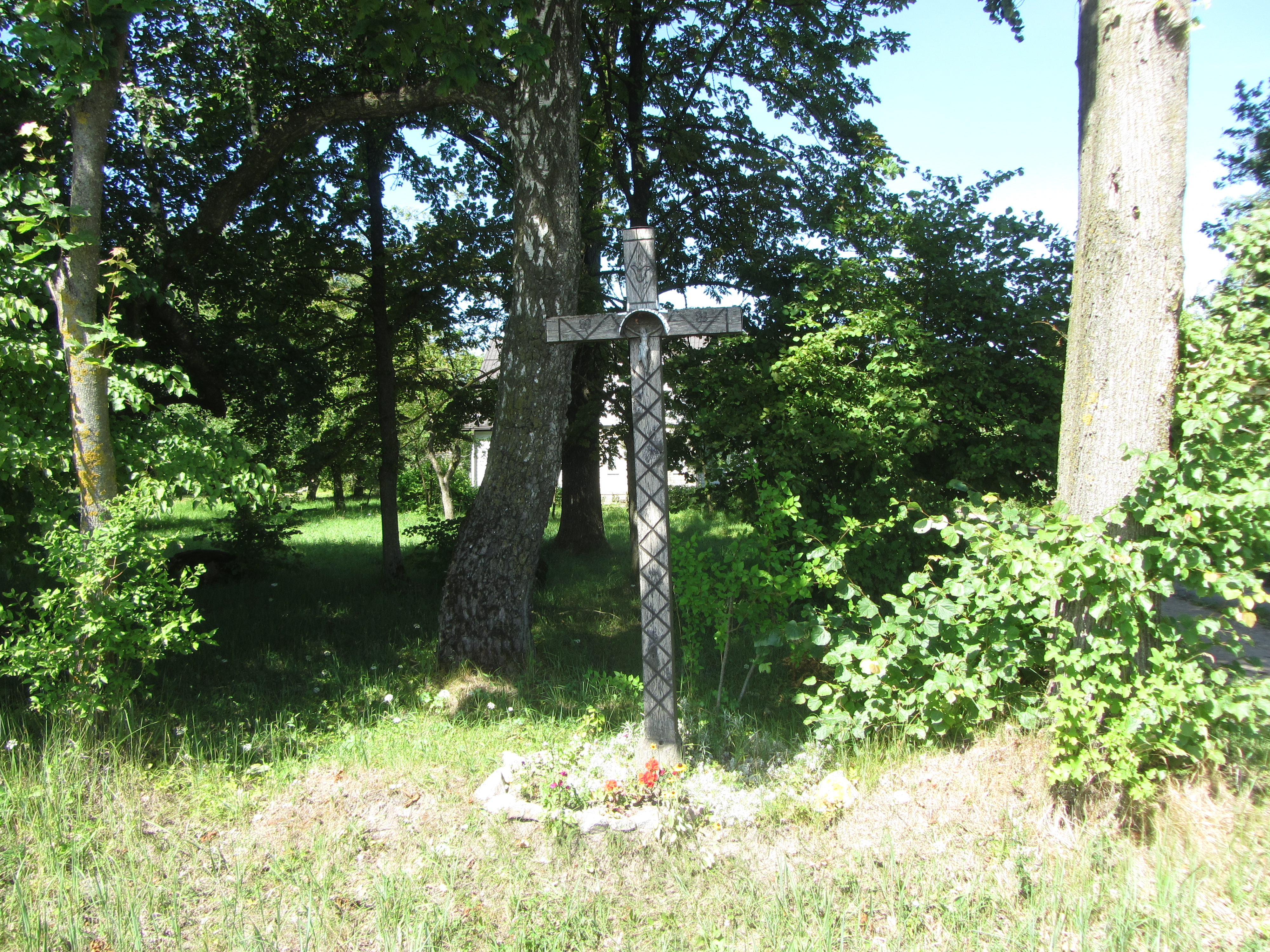 Žaslių sen., Lithuania